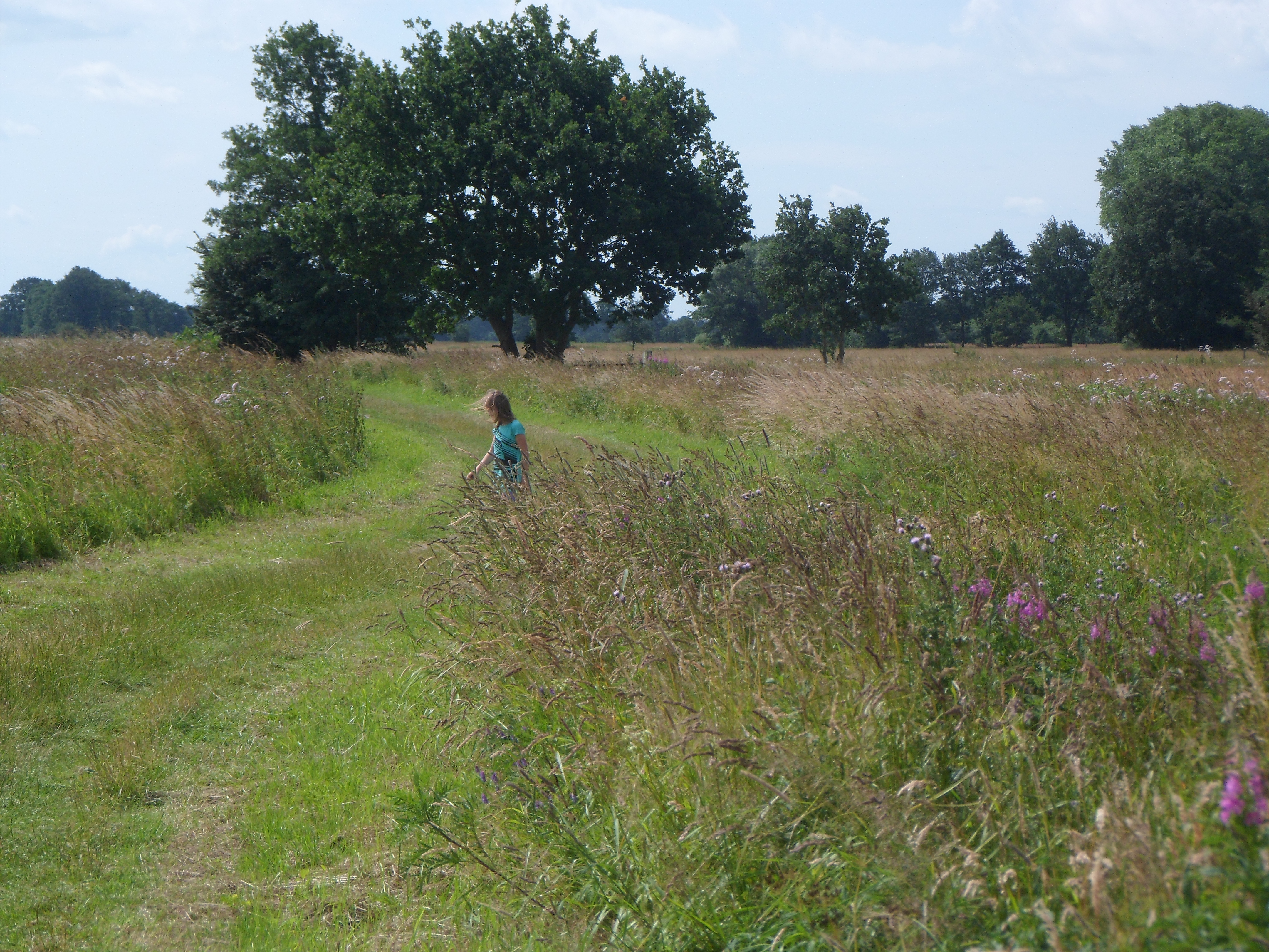 Zwischen Herbrum und Borsum im Naturschutzgebiet Emsauen zwischen Herbrum und Vellage (NSG WE 268) (Niedersachsen, Deutschland).